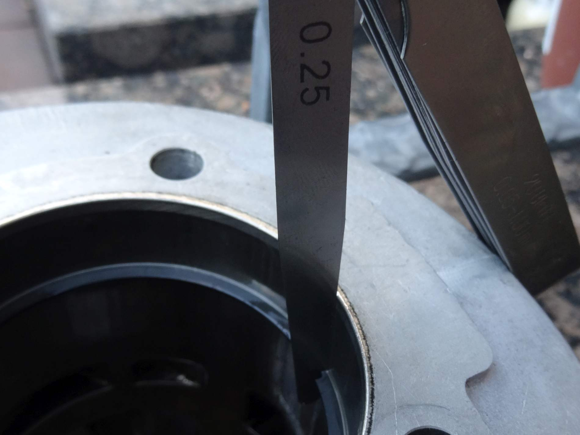 Neuer Kolbenring wird im Zylinder (malossi 210) auf Stoßspiel vermessen. Mit 0,25 mm bei einer 68,5mm Bohrung ist das optimale Stoßspiel erreicht.